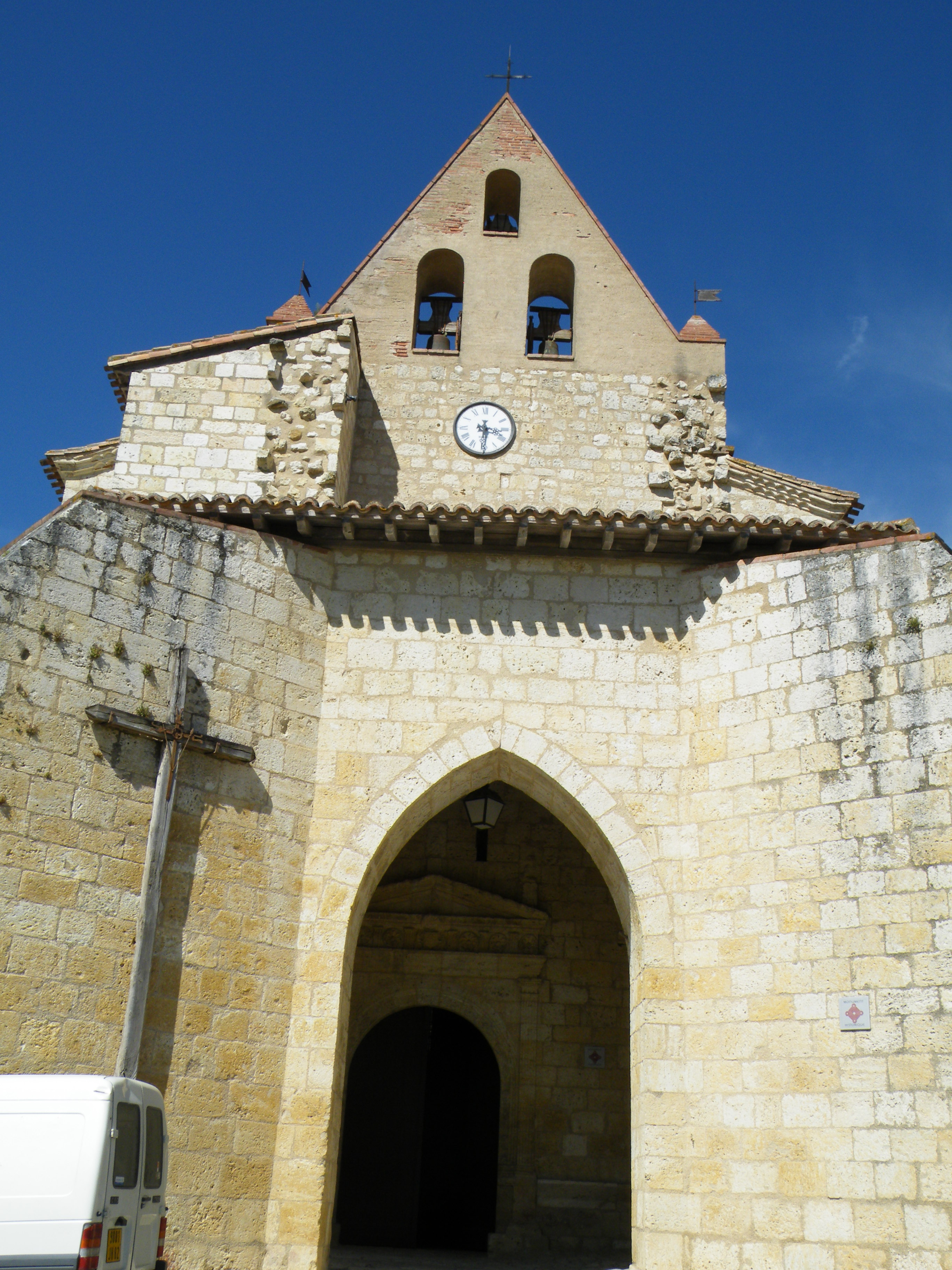 This building is en partie classé, en partie inscrit au titre des Monuments Historiques. .